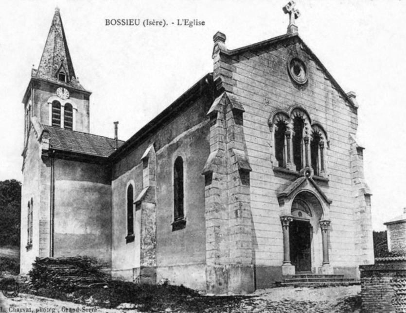 Bossieu (Isère) - L'église